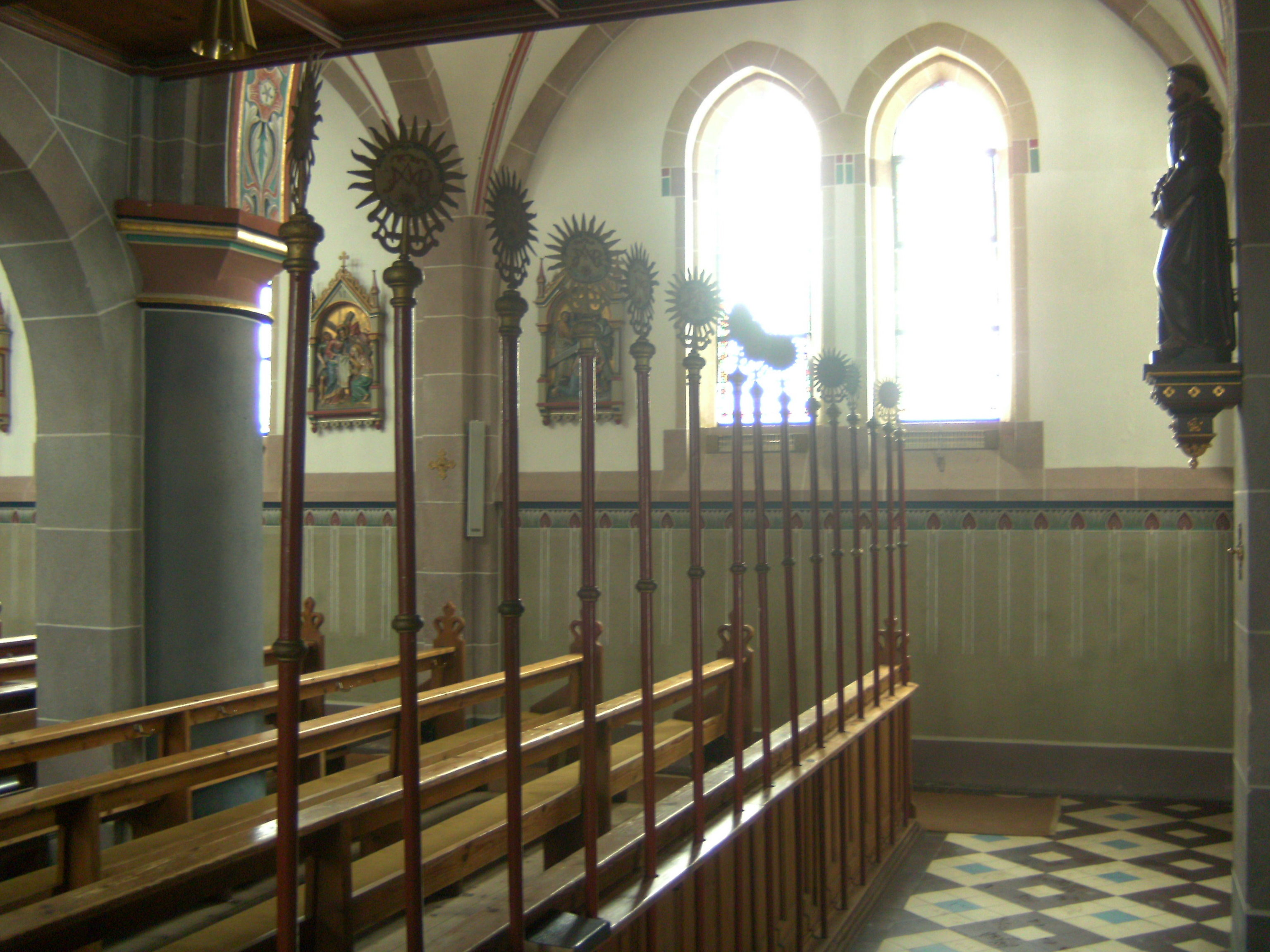 Kirche St. Martin in Kirchberg an der Iller